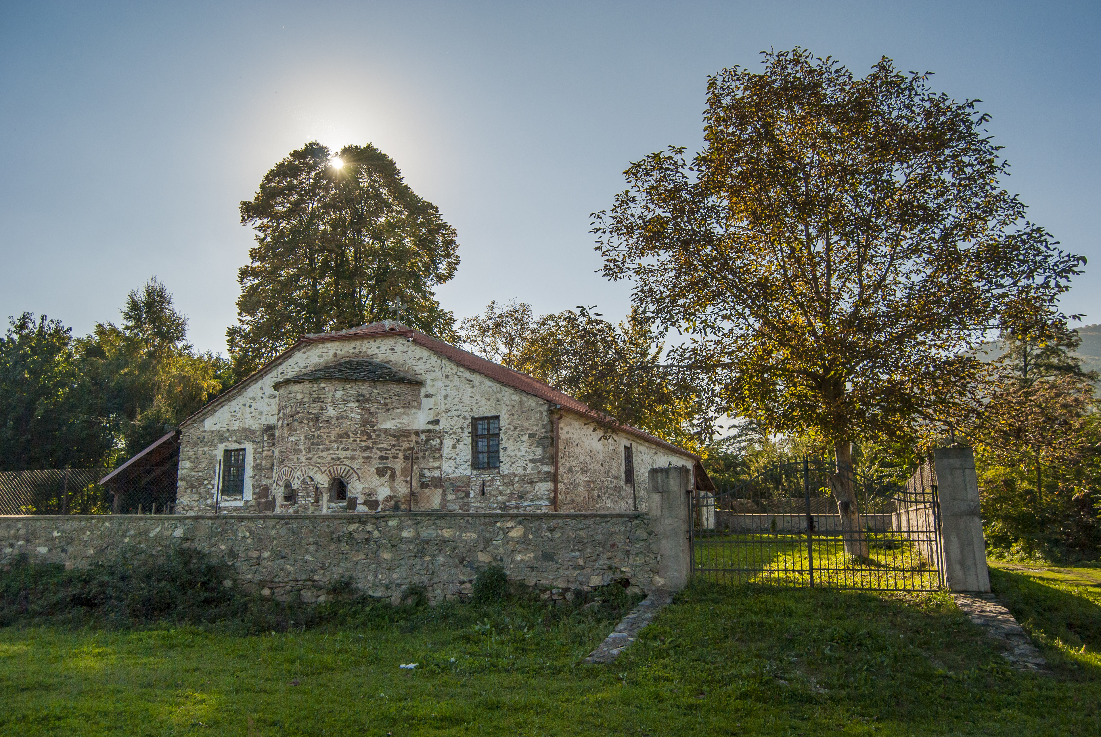 Црква „Успение на Пресвета Богородица“, главната селска црква во Велушина.